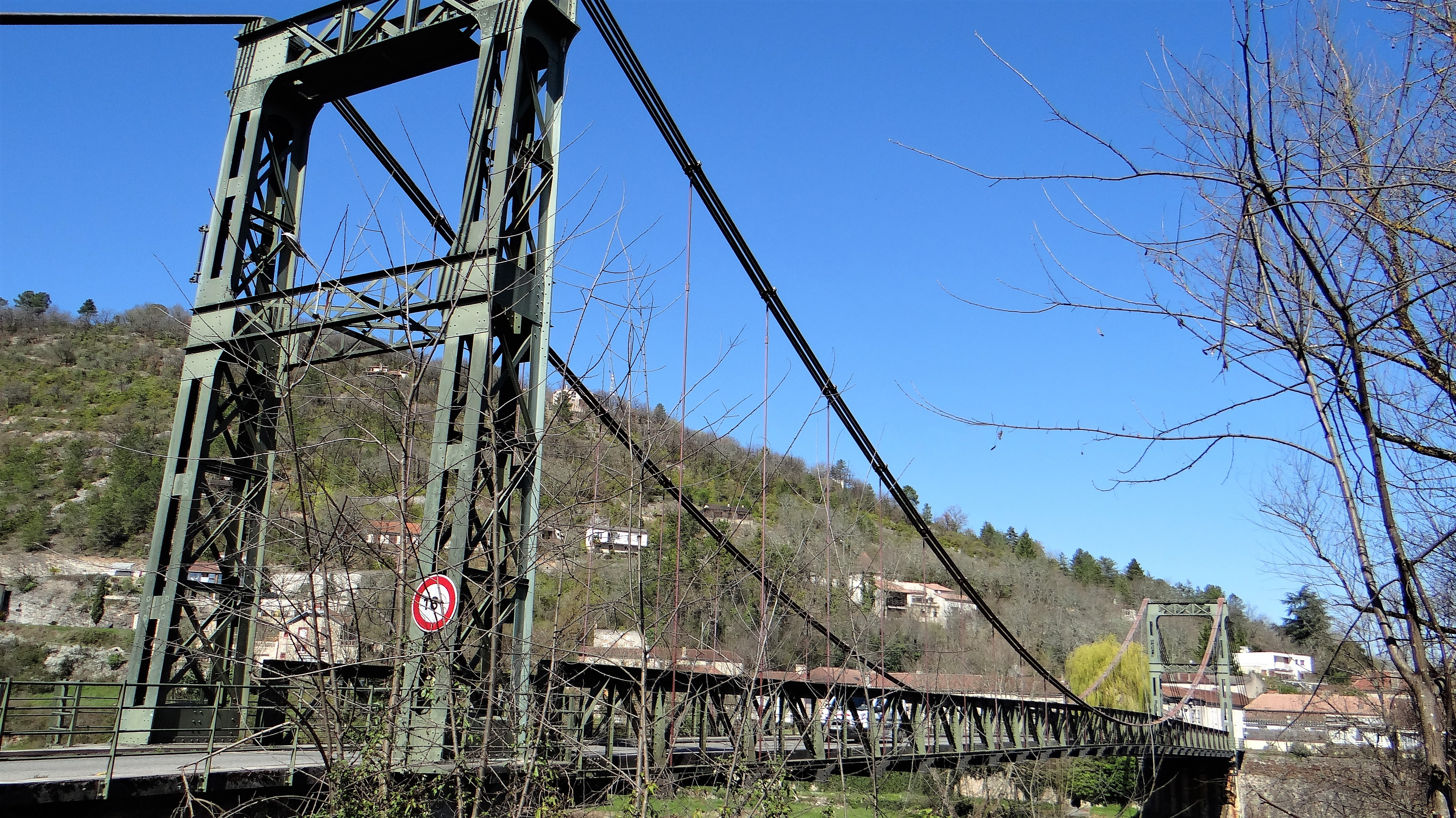 Castelfranc - Pont suspendu - Travée au-dessus du Lot